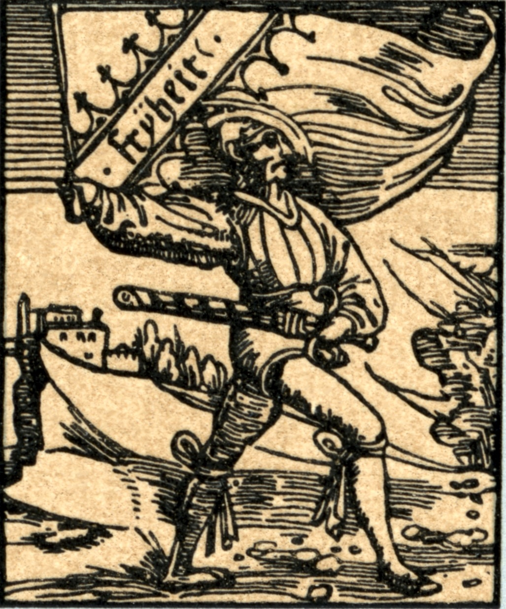 Illustration de la Guerre des paysans dans le Saint Empire romain germanique